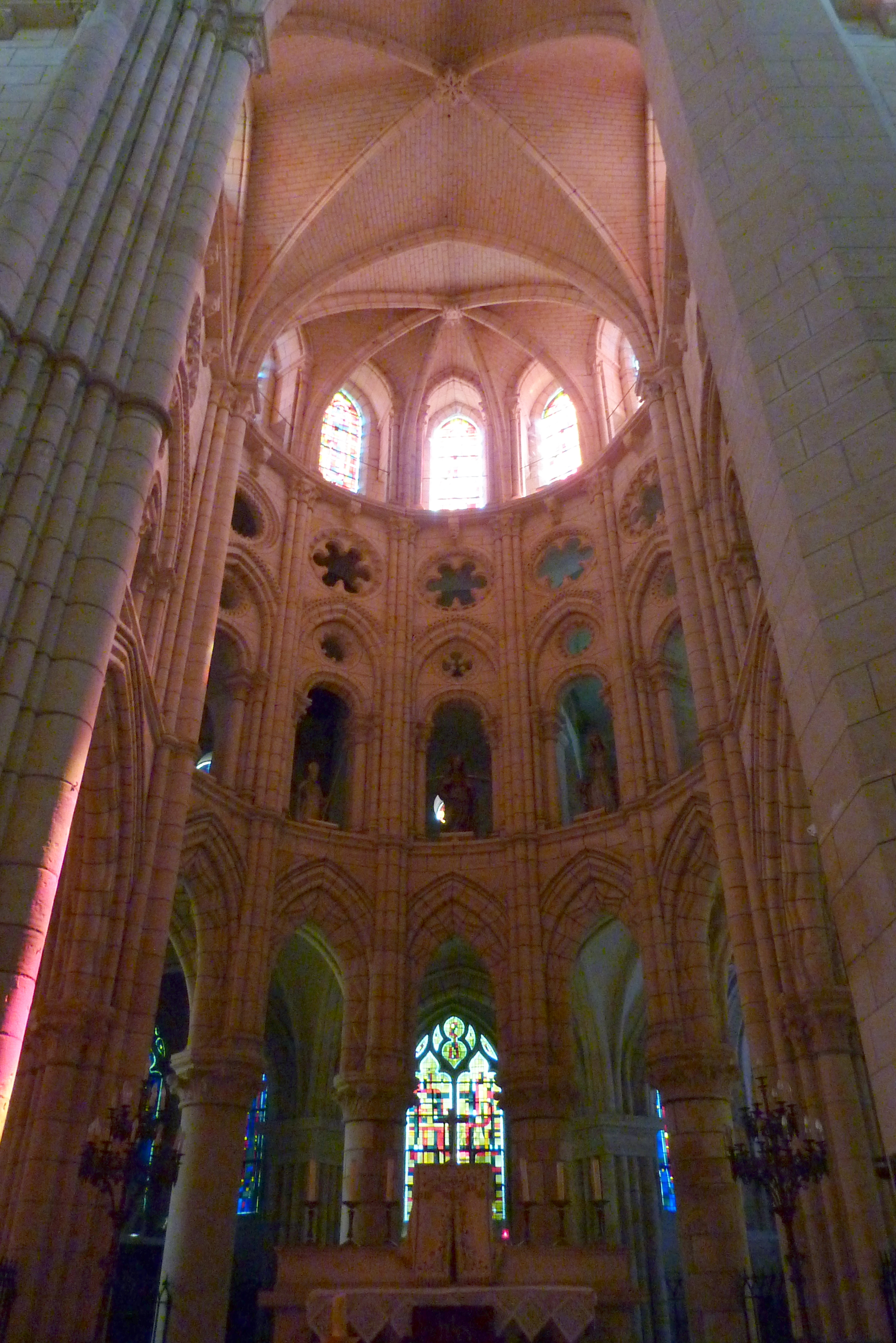 katholische Pfarrkirche Saint-Sulpice in Chars